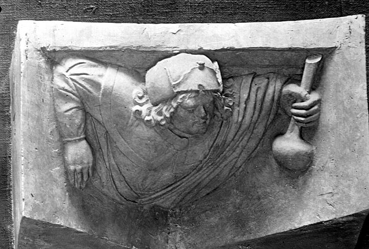 Hôtel Lallemant - Motif de l'escalier : personnage tenant une fiole (moulage), photographiée par Félix Martin-Sabon.